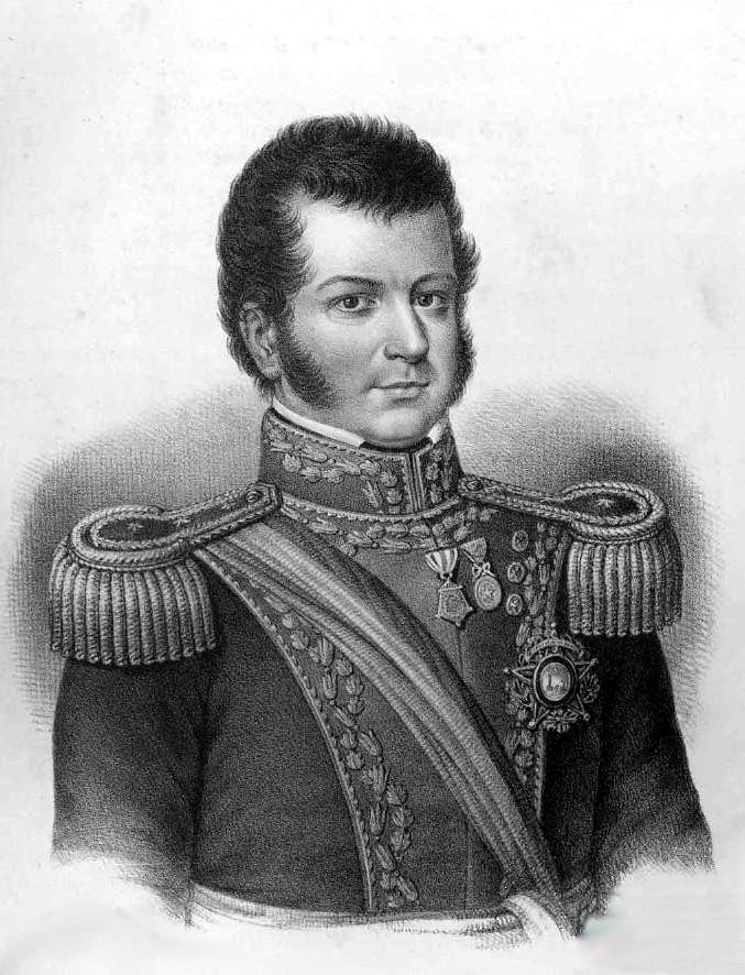 Bernardo O'Higgins Riquelme (Chillán, 20 de agosto de 1778 – Lima, 24 de enero de 1842) fue un político y militar chileno. Fue una de las figuras militares fundamentales de la independencia de su país y de Latinoamérica. Fue el primer jefe de Estado de la República de Chile bajo el título de director supremo entre 1817 y 1823, cuando renunció voluntariamente al cargo para evitar una guerra civil, exiliándose en el Perú hasta su muerte. Fue capitán general del Ejército de Chile, brigadier de las Provincias Unidas del Río de la Plata, general de la Gran Colombia y uno de los principales organizadores de la Expedición Libertadora del Perú.